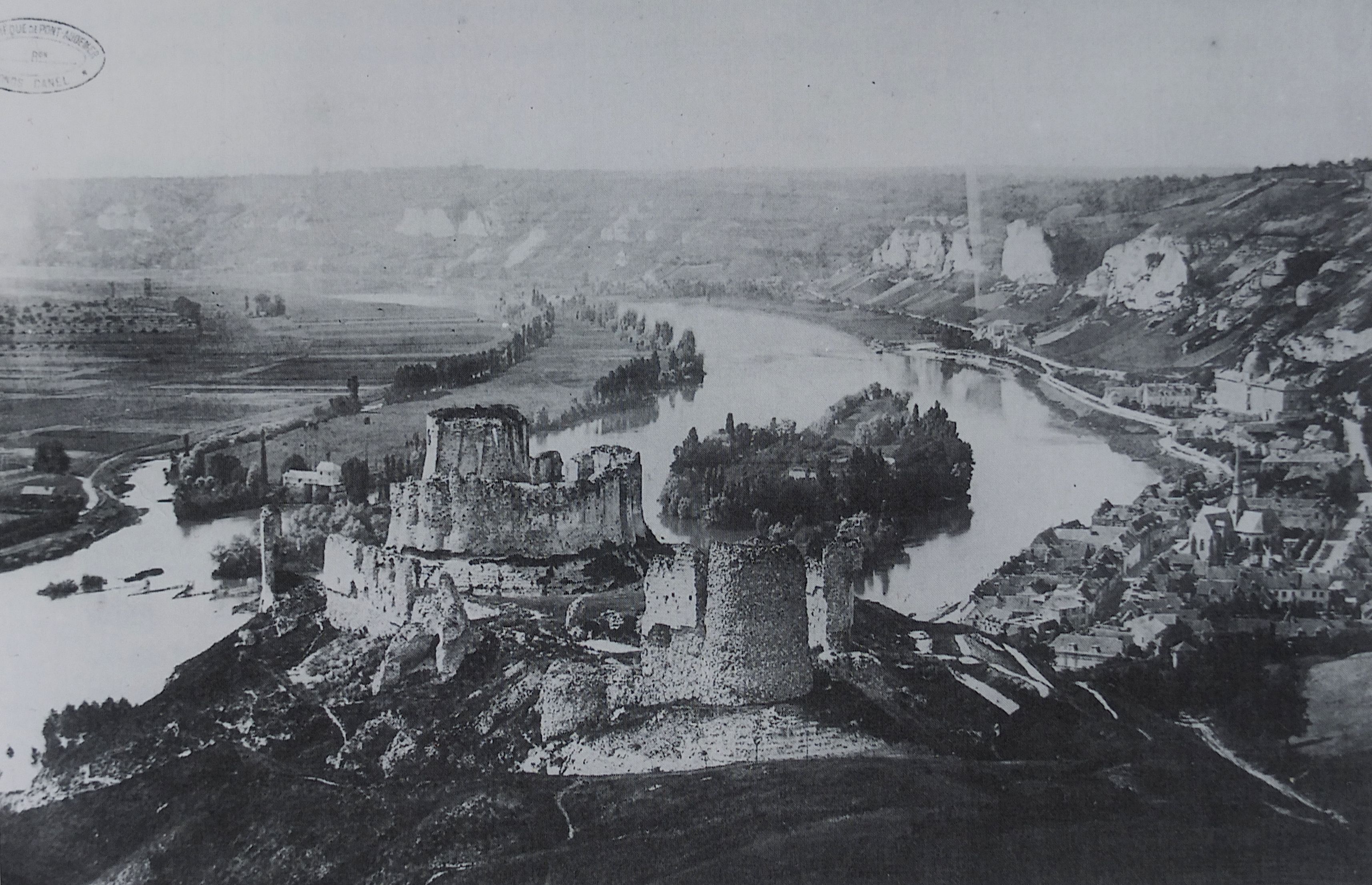 Reproduction en héliogravure par Paul Dujardin, 1896. Photographie d'Émile-André Letellier. La Normandie monumentale et pittoresque, édifices publics, églises, châteaux, manoirs, etc.,,. Éditions Lemasle et Cie, Le Havre, 1893-1899.